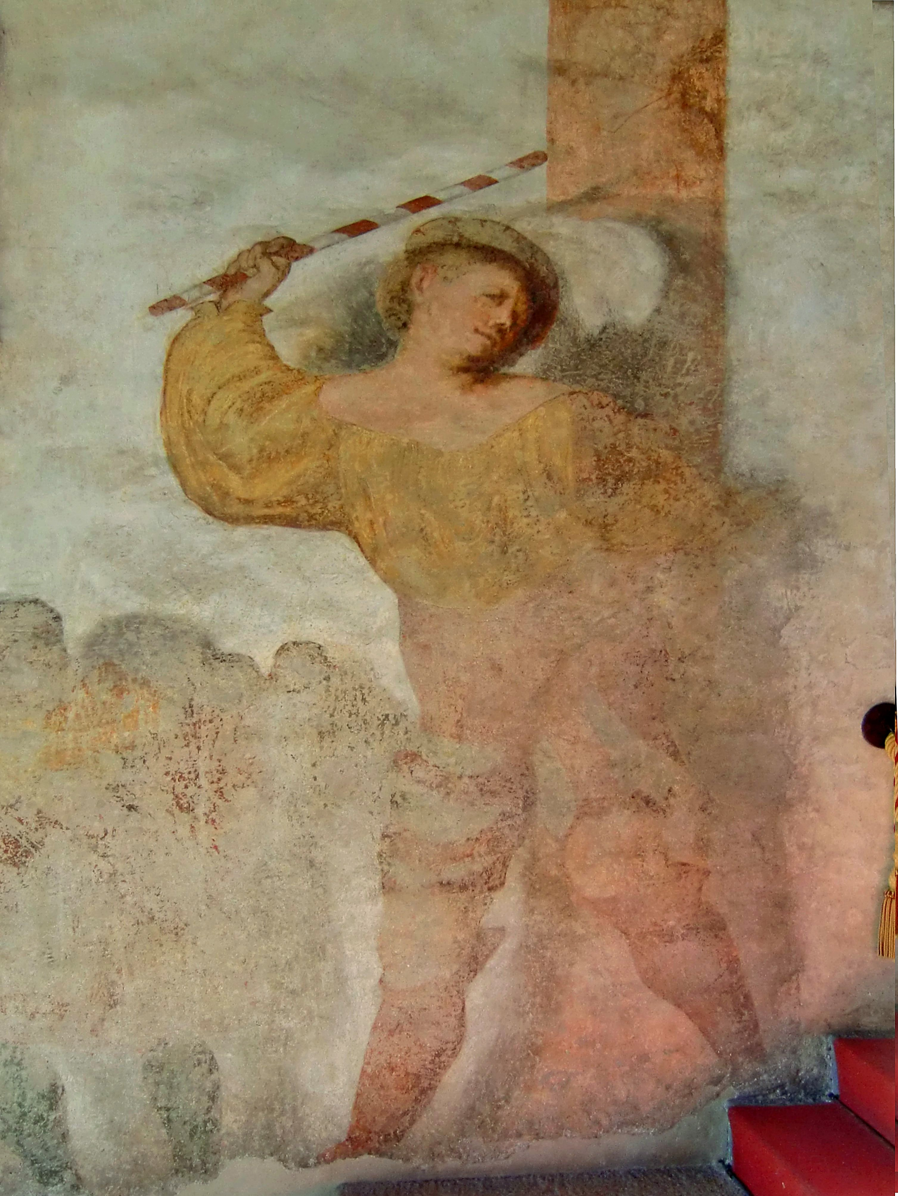 Gerolamo di Romano called Romanino, "Lo scaccia-importuni" (Giant protecting the house against troublesome visitors)", 1531-32, Castello del Buonconsiglio, Trento, Italy